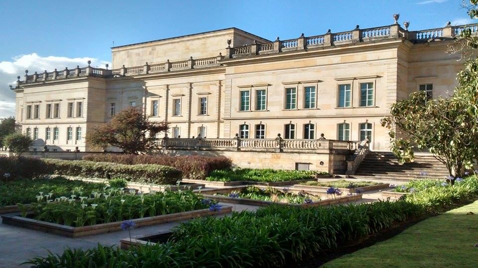 Casa de Nariño, costado sur